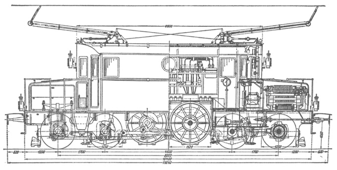 3000-V-Drehstrom-Lokomotive Nr. 367 für die Simplonstrecke der SBB